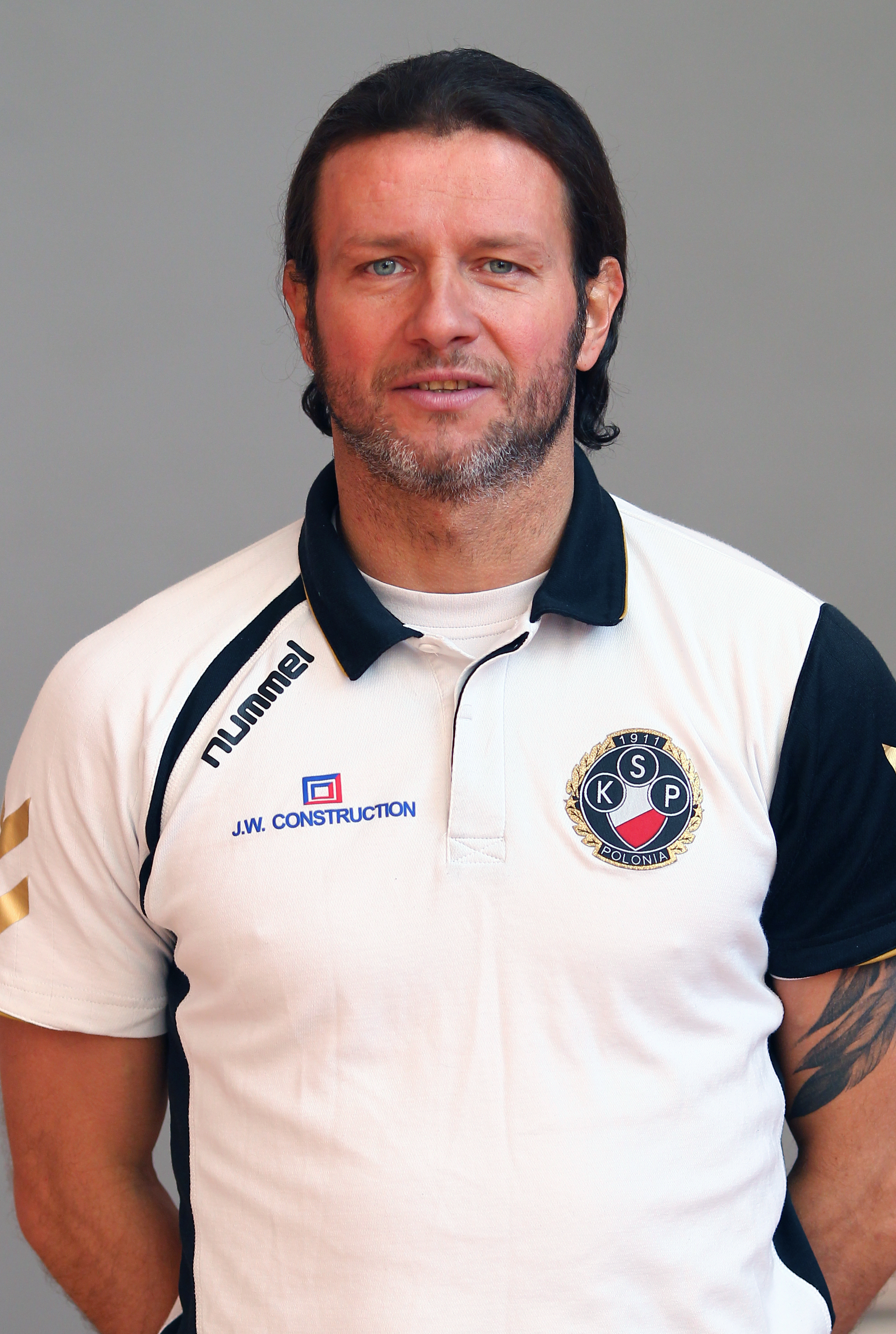 goalkeeping coach Radosław Majdan (2011)